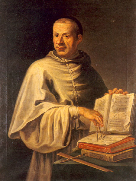 Guido Grandi (1671-1742), Italian mathematician